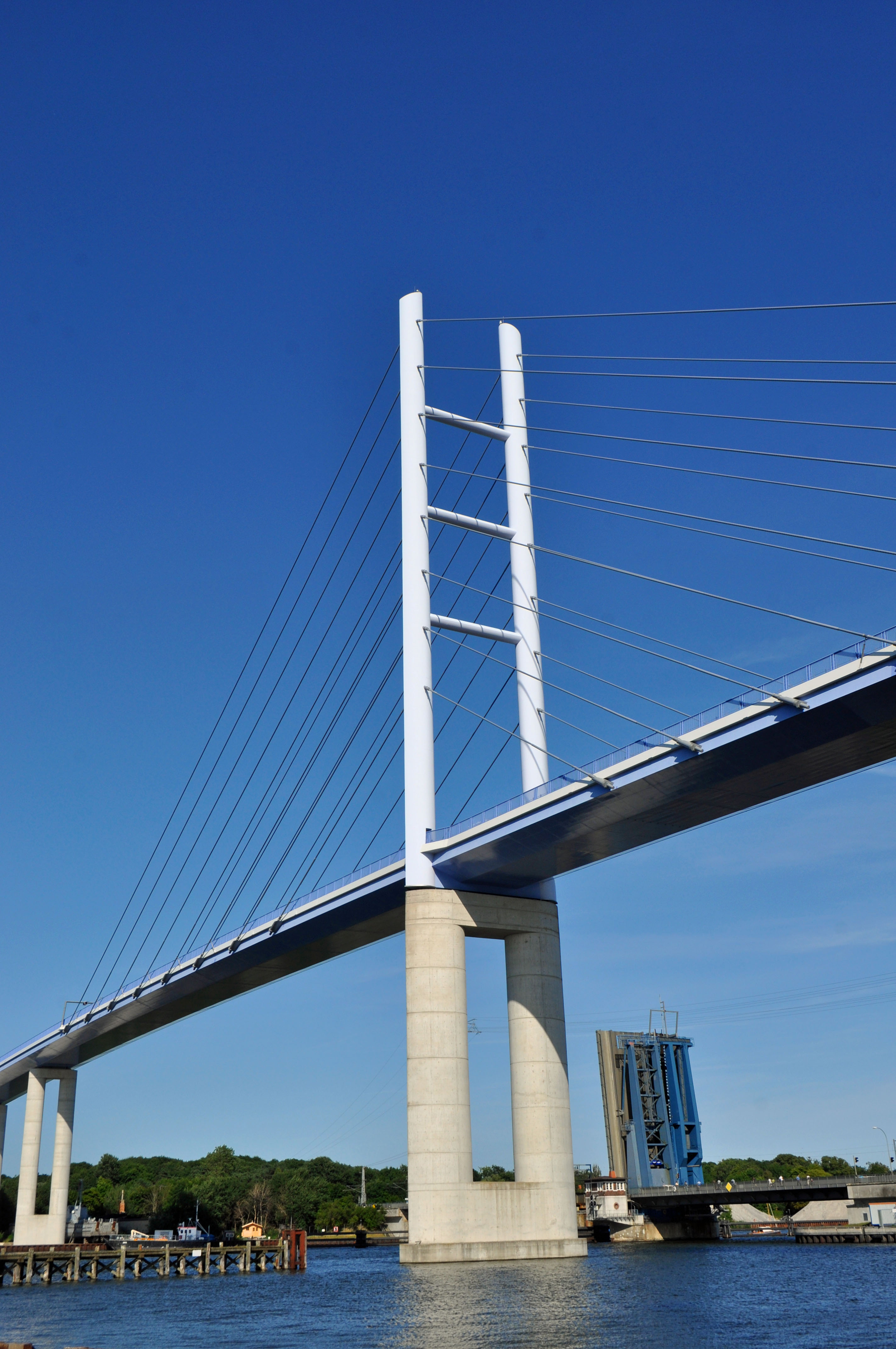 Rügenbrücke Stralsund / Ziegelgrabenbrücke